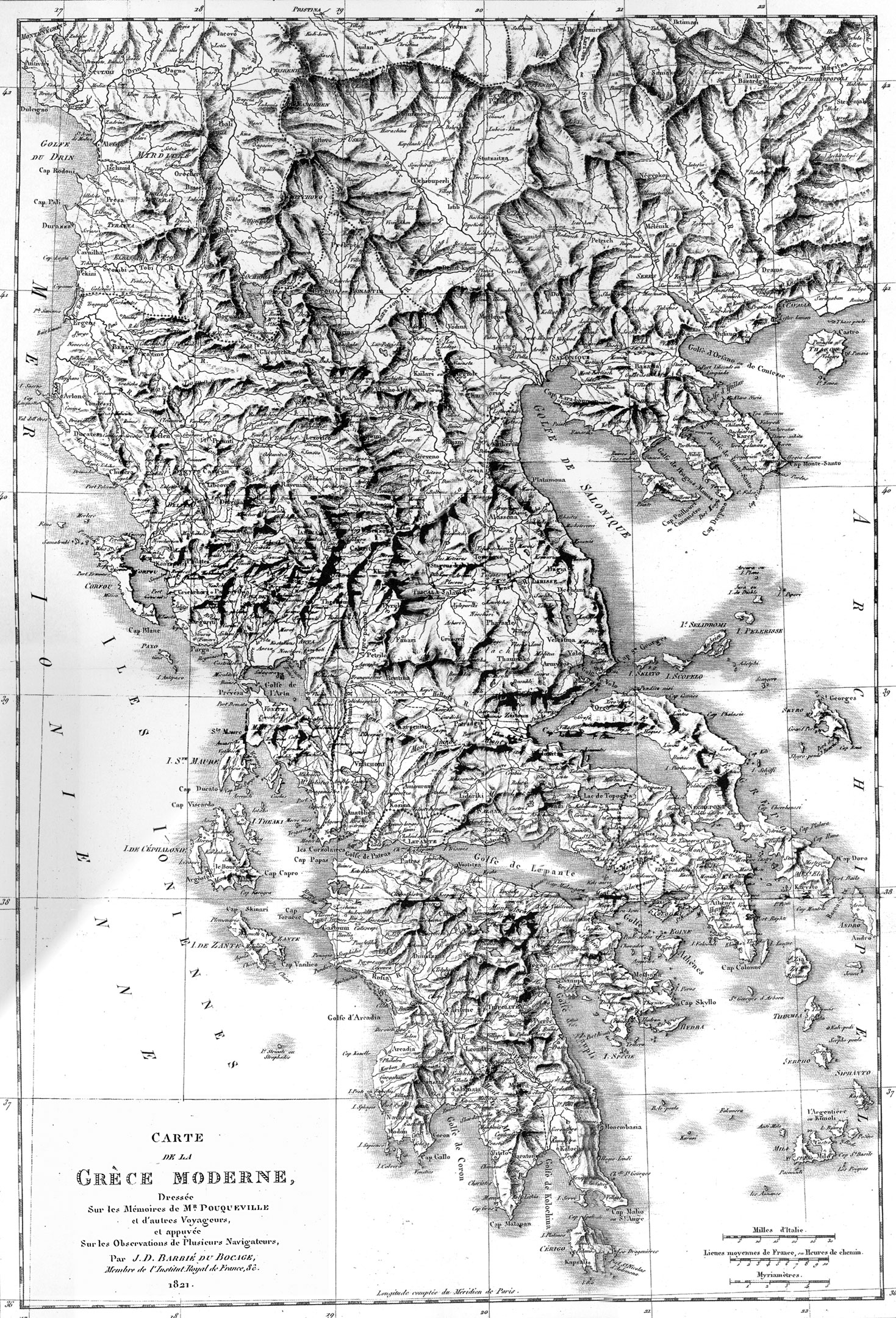 Carte de la Grece Moderne